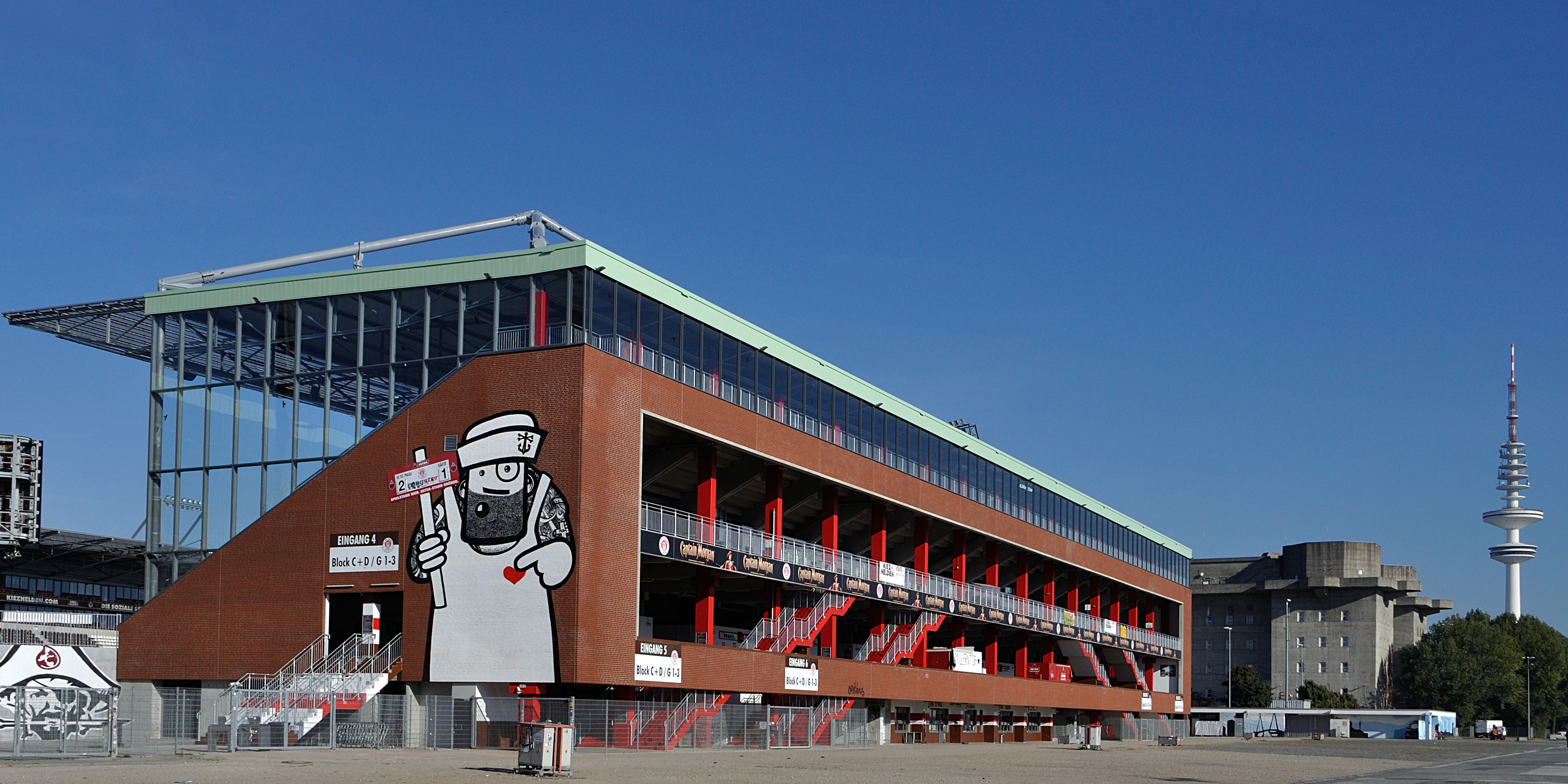 Gegengerade des Millerntor-Stadions in Hamburg-St. Pauli, Blick vom Heiligengeistfeld.